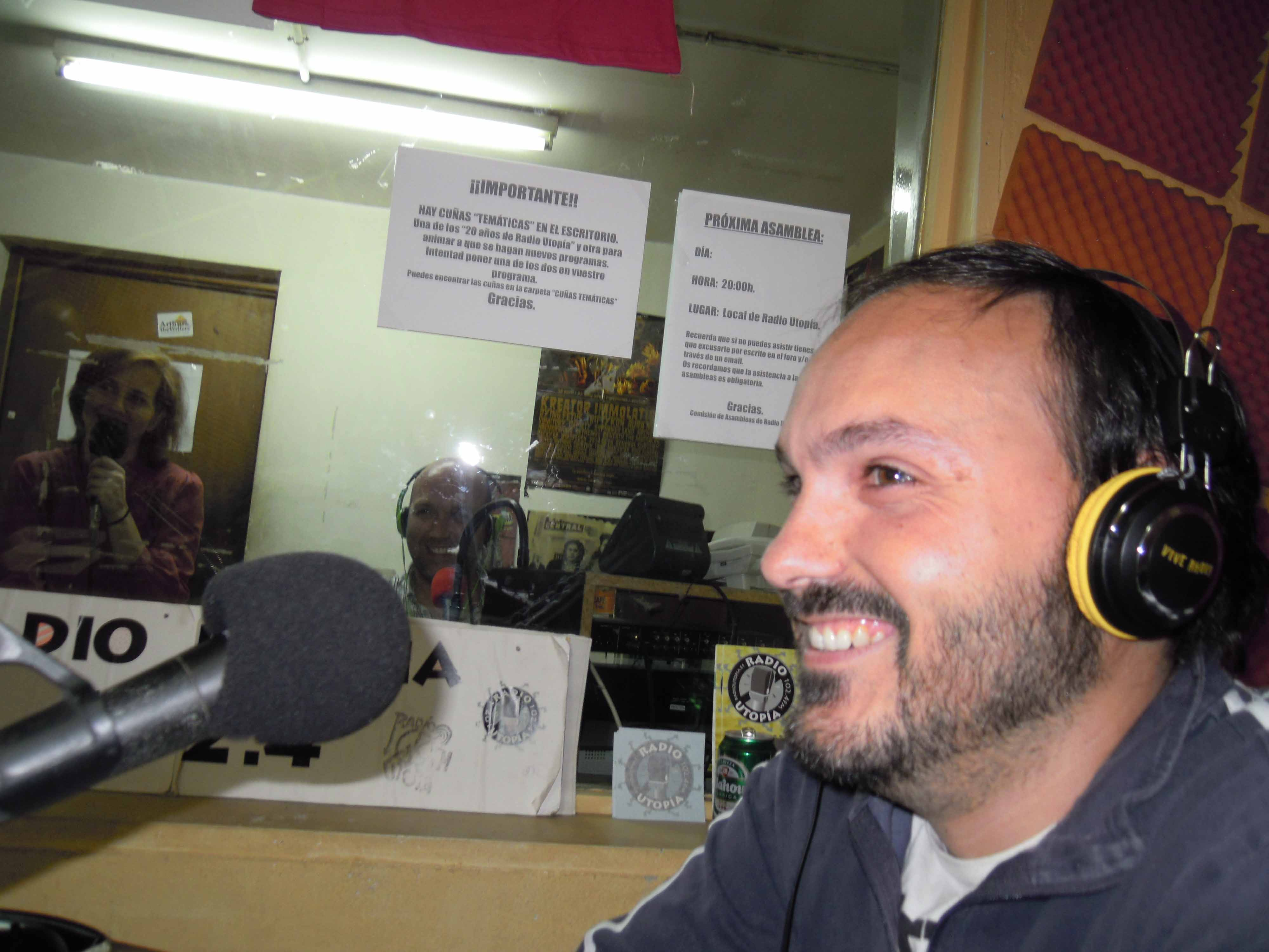 El investigador Enrique Royuela en los micrófonos del programa de radio "El Astrolabio"